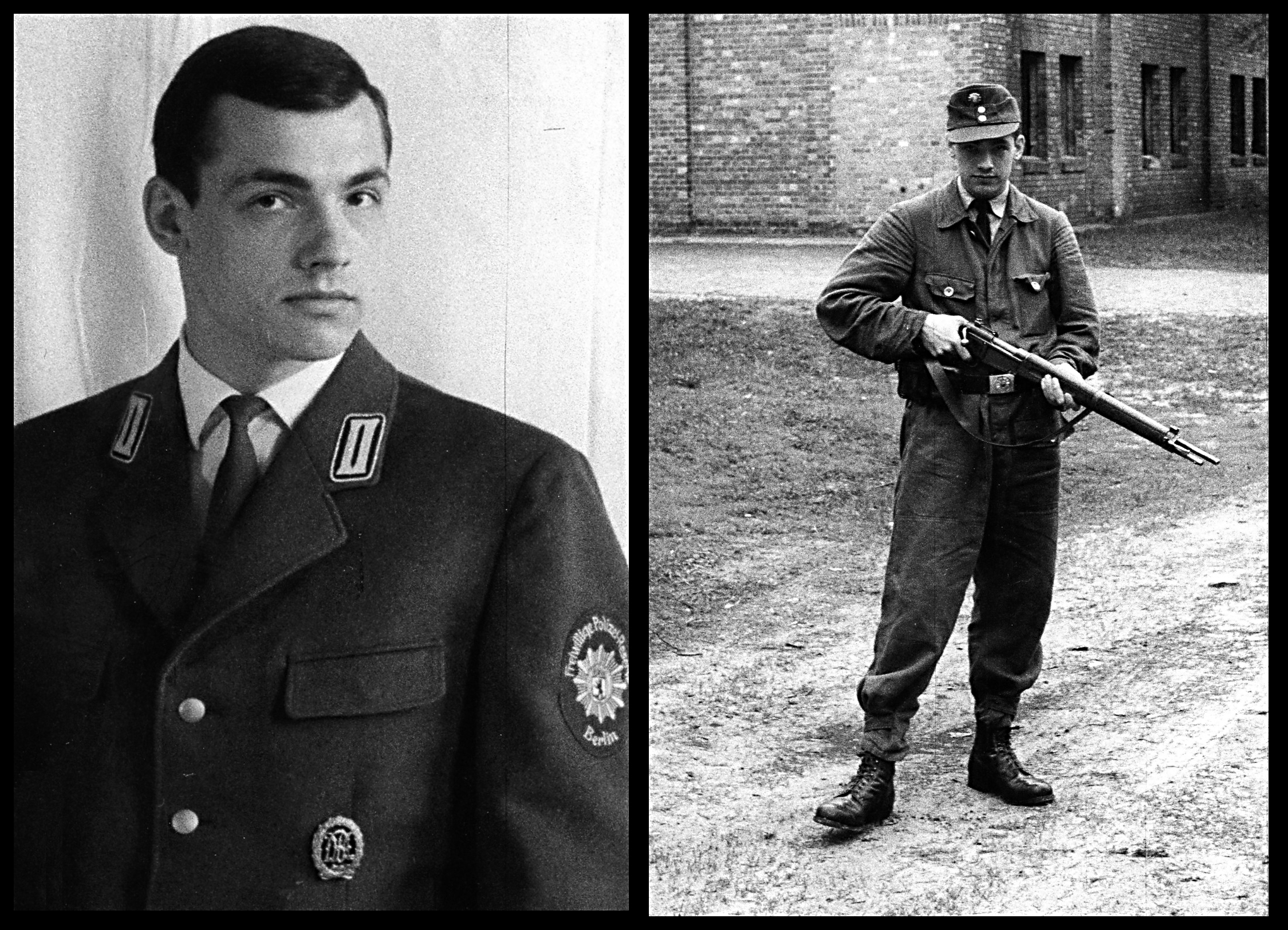 Die kombinierten Fotos zeigen ein Mitglied der Freiwilligen Polizeireserve Berlin, den Verwaltungsbeamten Ulrich Waack, während der Grundausbildung und in der damals üblichen Polizeiuniform mit dem Ärmelabzeichen der Freiwilligen Polizeireserve Berlin.